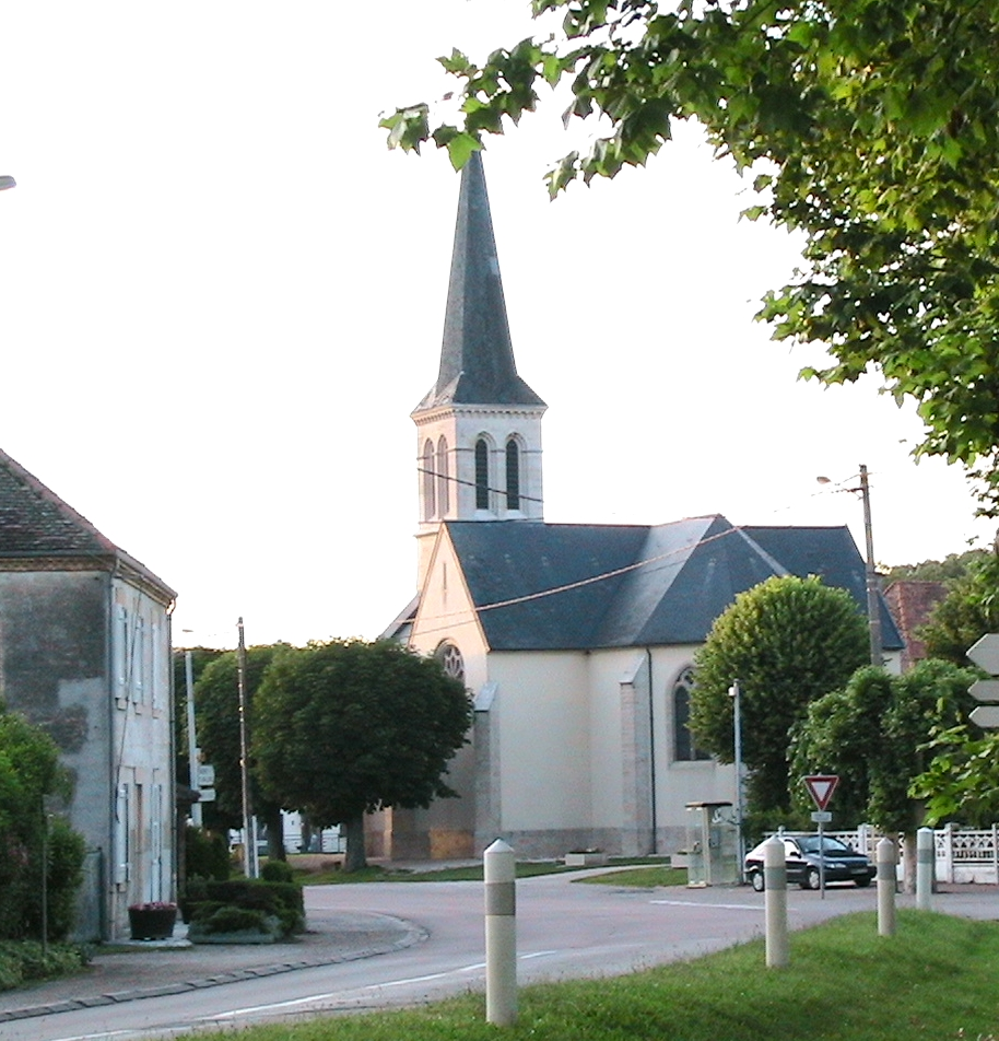 L'Église de Pagny-le-Château. Photo prise en extérieur à Pagny-le-Château. Photographie de l'église en début de soirée. Le bâtiment a été rénové très récemment du moins en sa façade.